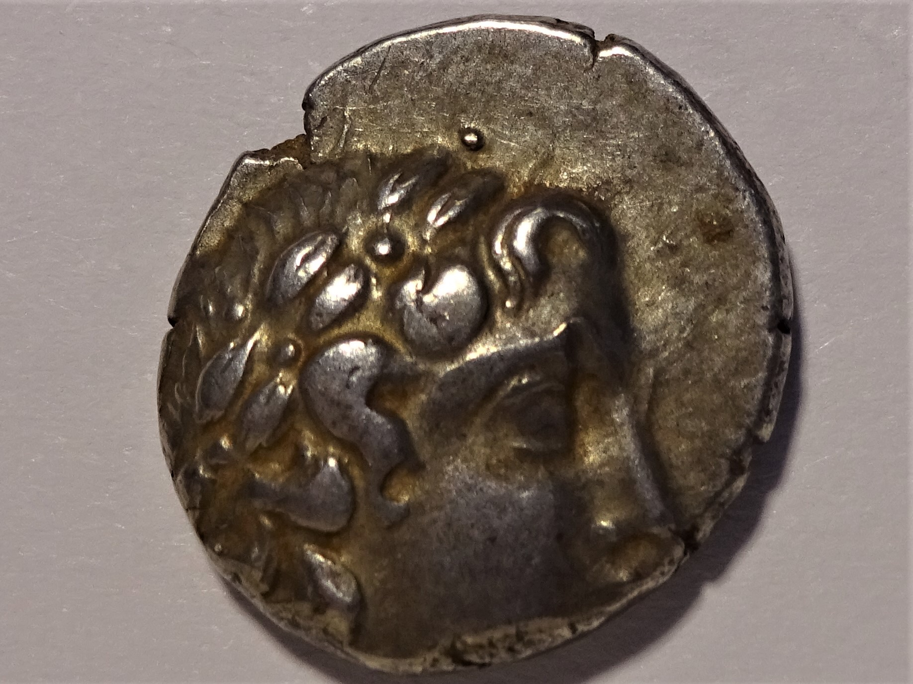 Drachme der Lykischen Liga aus Rhodiapolis, Apollokopf, nach 168 v. Chr., Szaivert/Sear 5398